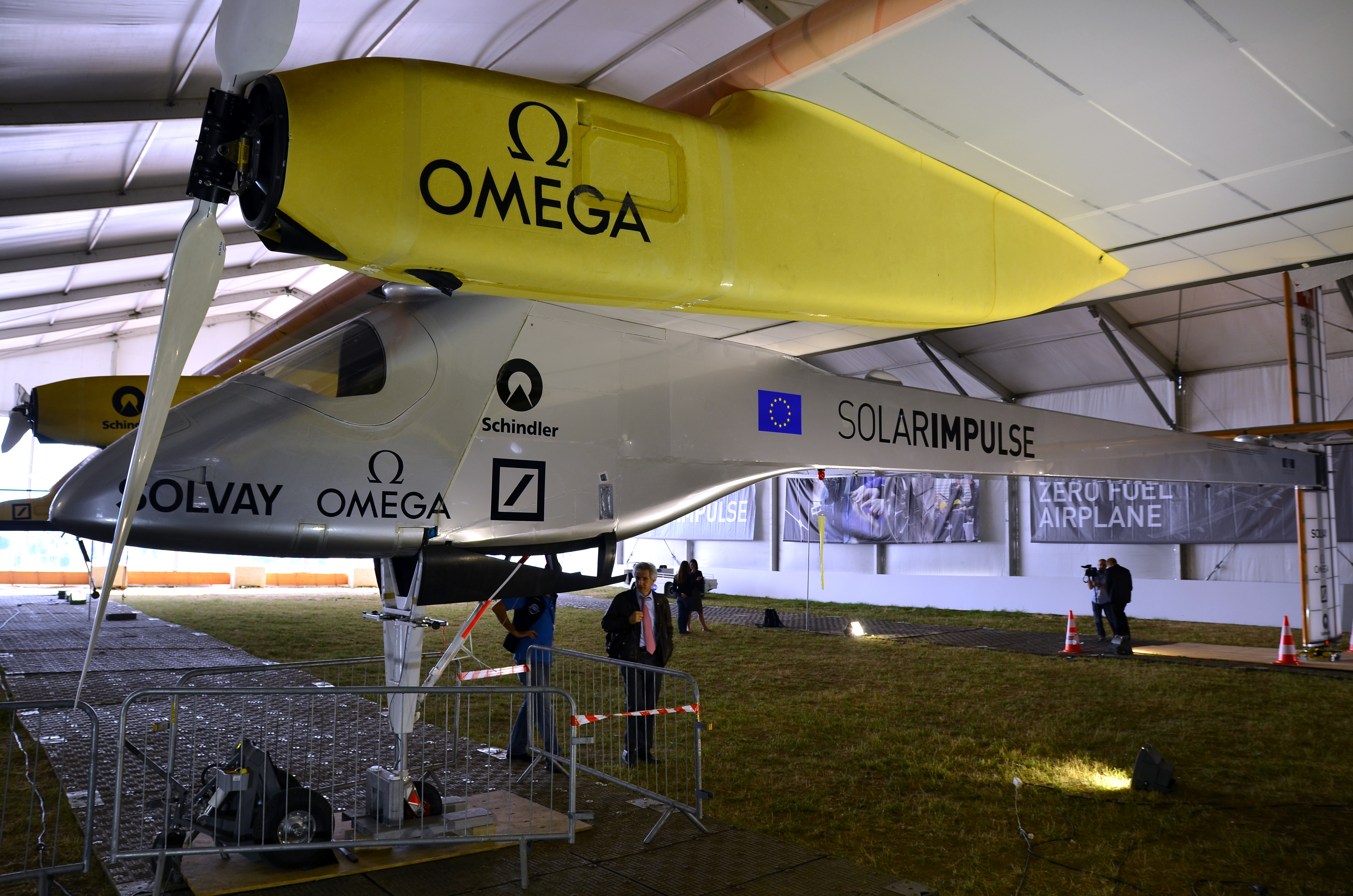 Solar Impulse (HB-SIA) au salon du Bourget 2011